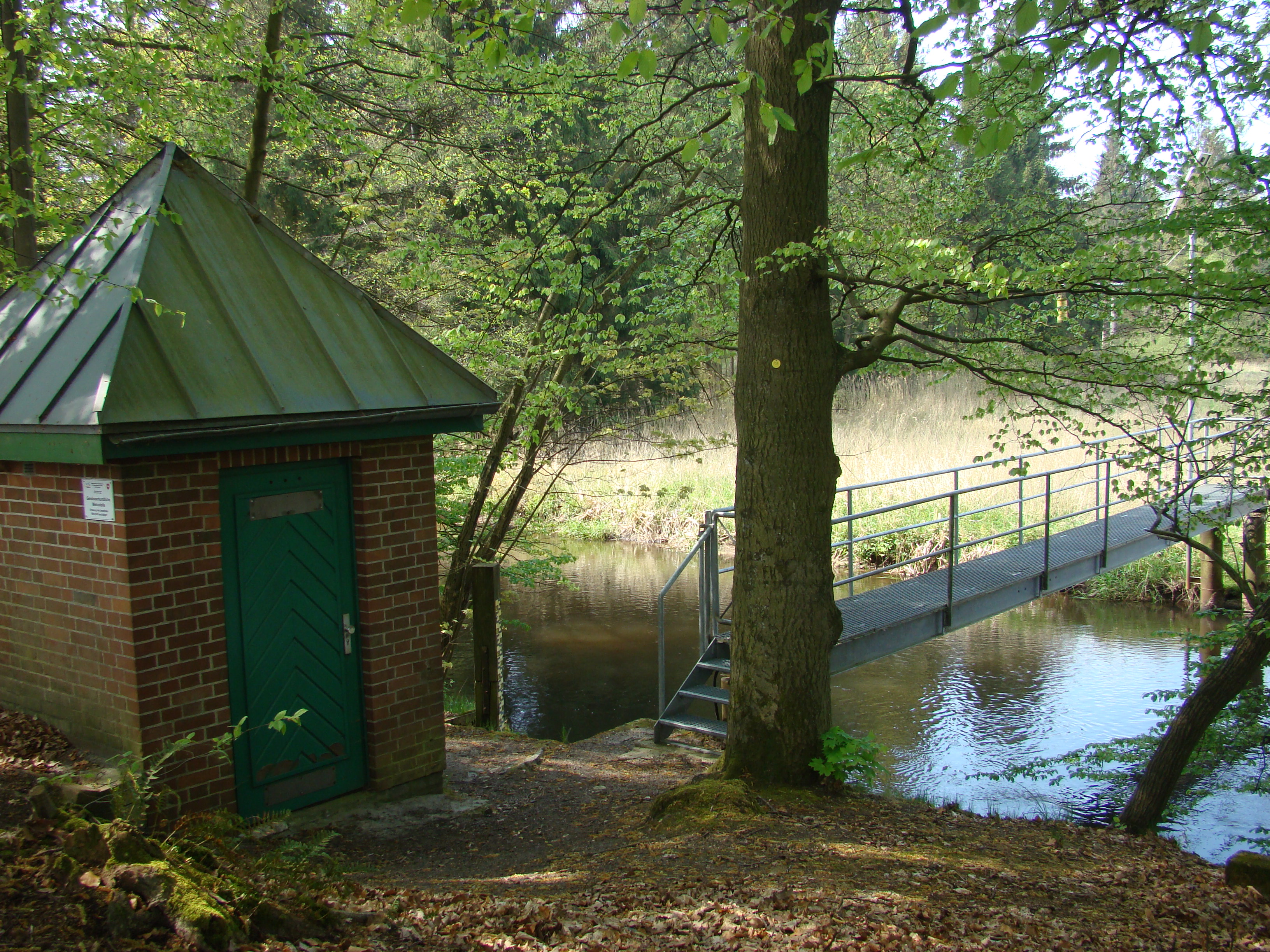 Pegelmessstelle der NLWKN in Feuerschützenbostel (Stadt Bergen), Lower Saxony